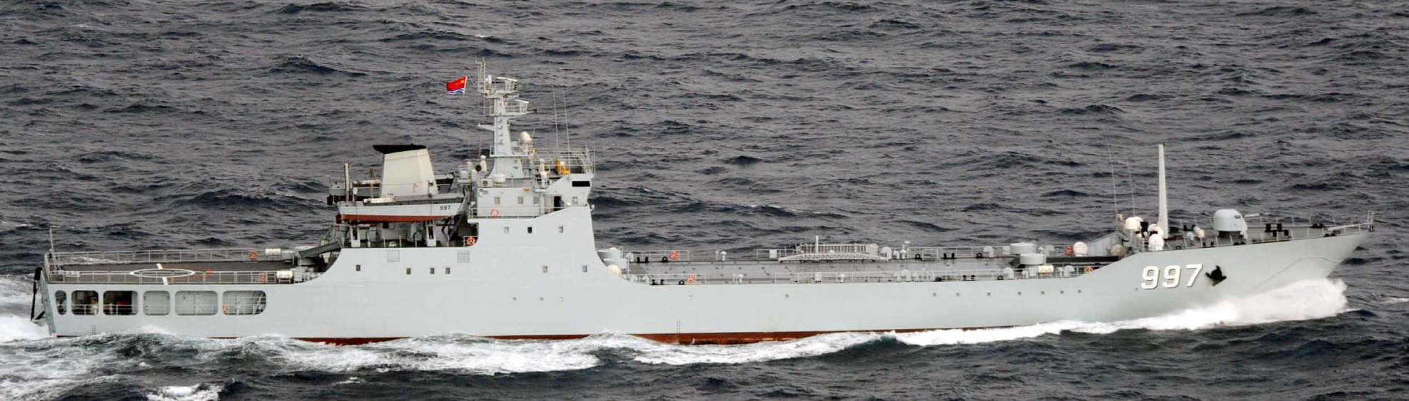 ８月１７日（月）午前８時頃、第１航空群所属「Ｐ－３Ｃ」（鹿屋）及び佐世保地方隊「あまくさ」（佐世保）が、下対馬の南西約１２０～１４０ｋｍの海域を北東進する中国海軍ルージョウ級ミサイル駆逐艦１隻、ソブレメンヌイII級ミサイル駆逐艦１隻、ジャンカイII級フリゲート２隻、ユージャオ級揚陸艦１隻、ユーチンII級揚陸艦１隻、フチ級補給艦１隻の合計７隻を確認した。その後、当該艦艇が対馬海峡を北上したことを確認した。